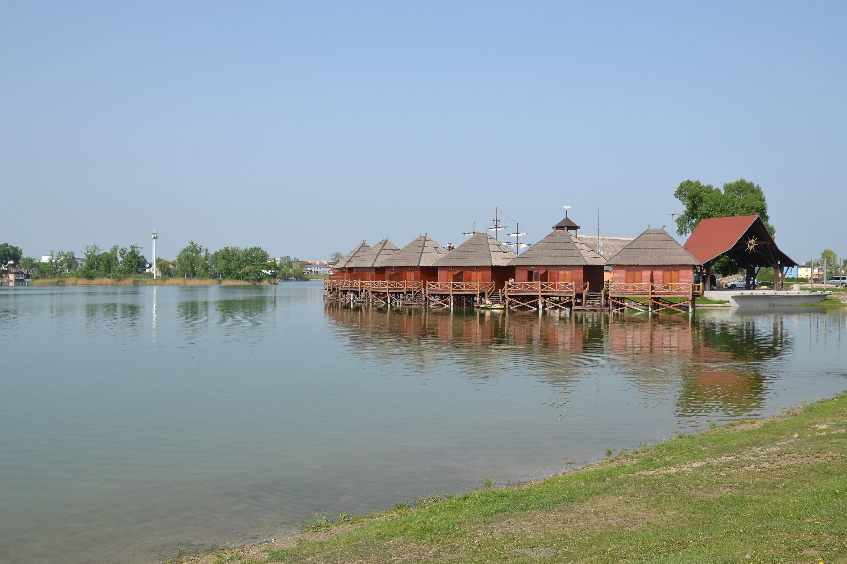 Senec (Szenc, Wartberg) - Slnečné jazerá